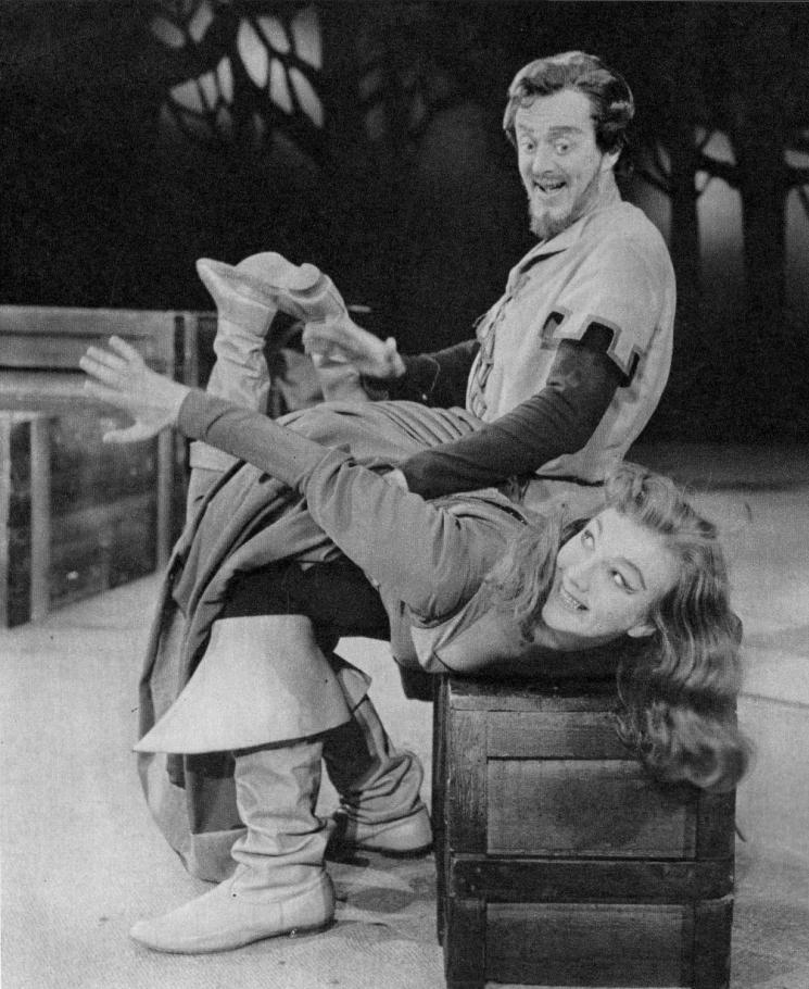 Suomalaiset näyttelijät Heikki Savolainen (1922–1975) ja Maikki Länsiö (1932–1996) William Shakespearen näytelmässä "Miten äkäpussi kesytetään" Suomen kansallisteatterissa vuonna 1963.